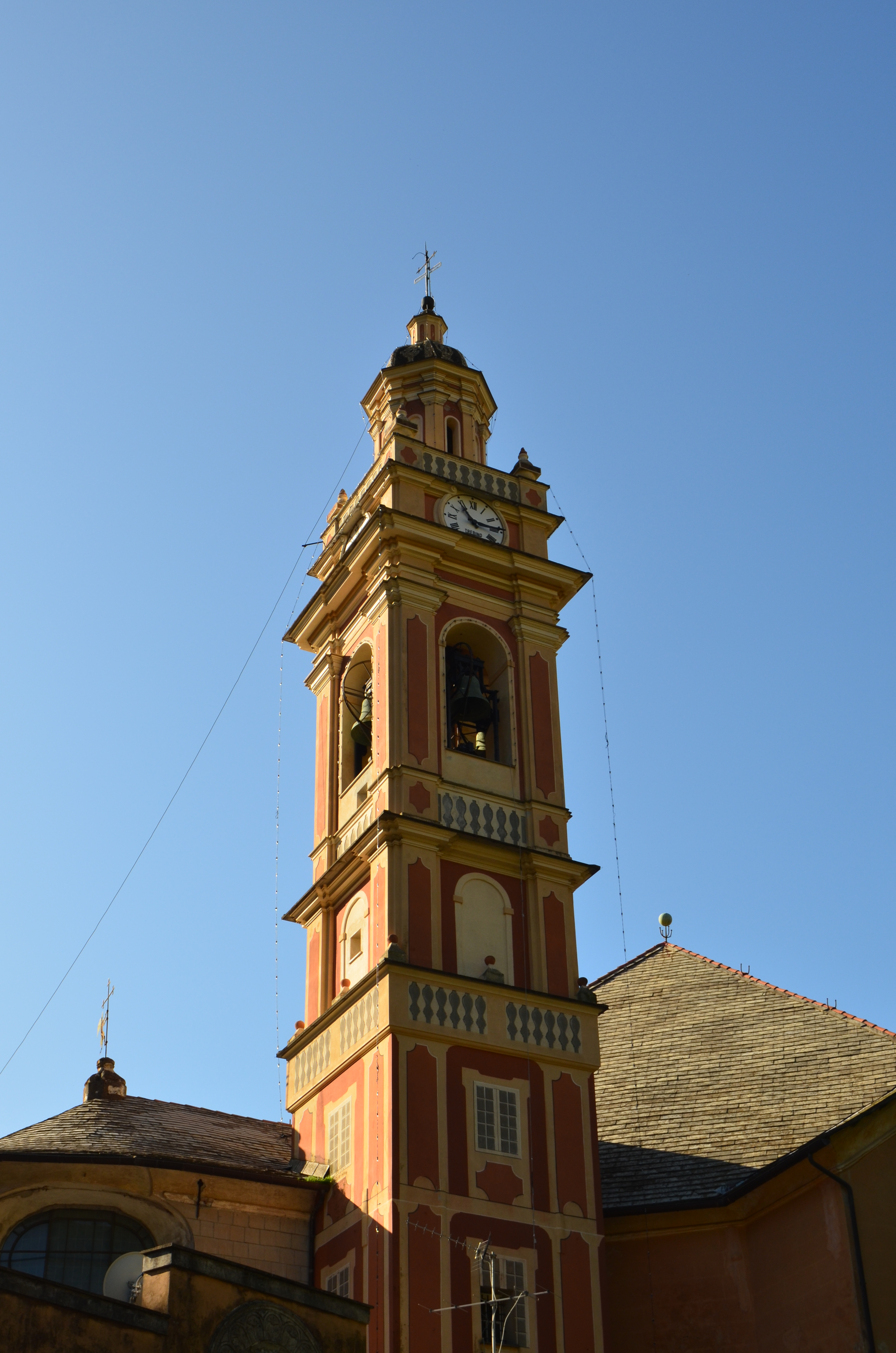 Chiesa di San Martino, Zoagli, Liguria, Italia